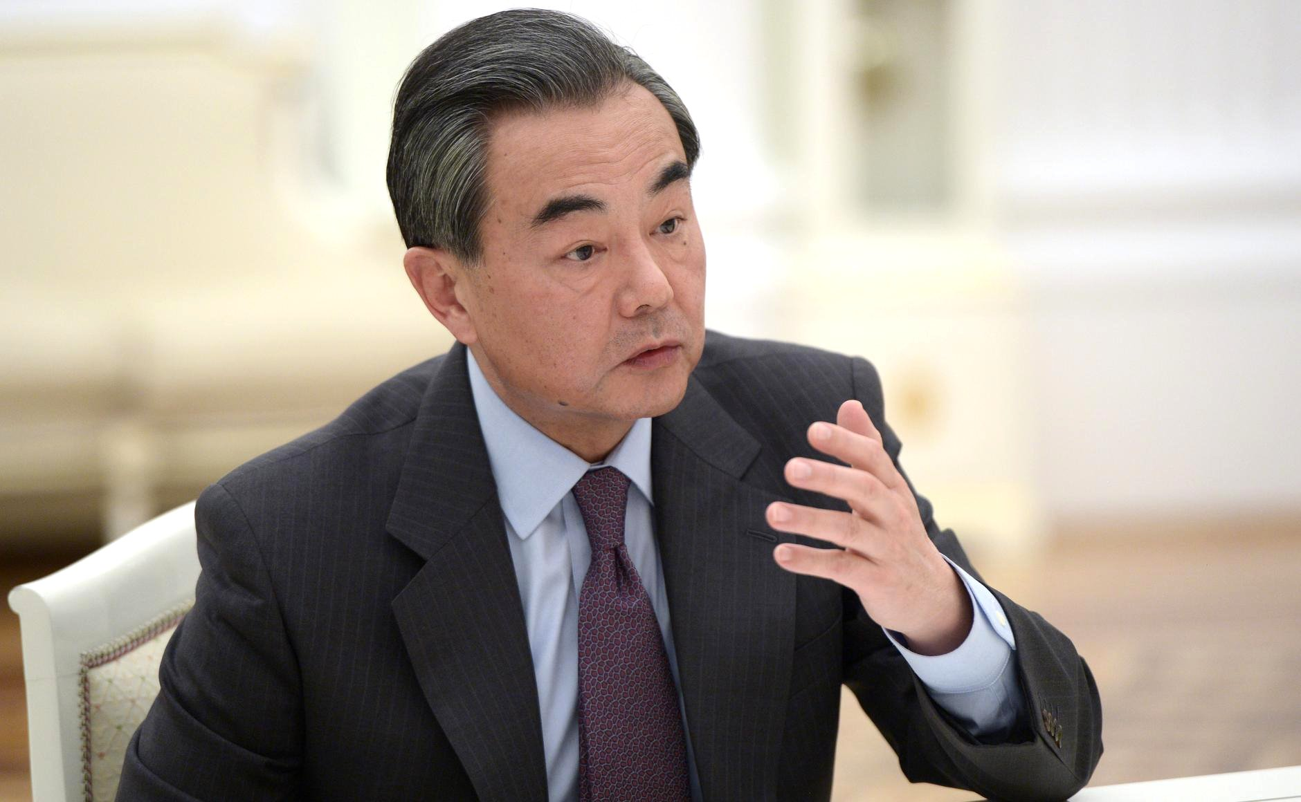 Министром иностранных дел Китайской Народной Республики Ван И во время встречи с Президентом России Владимиром Путиным